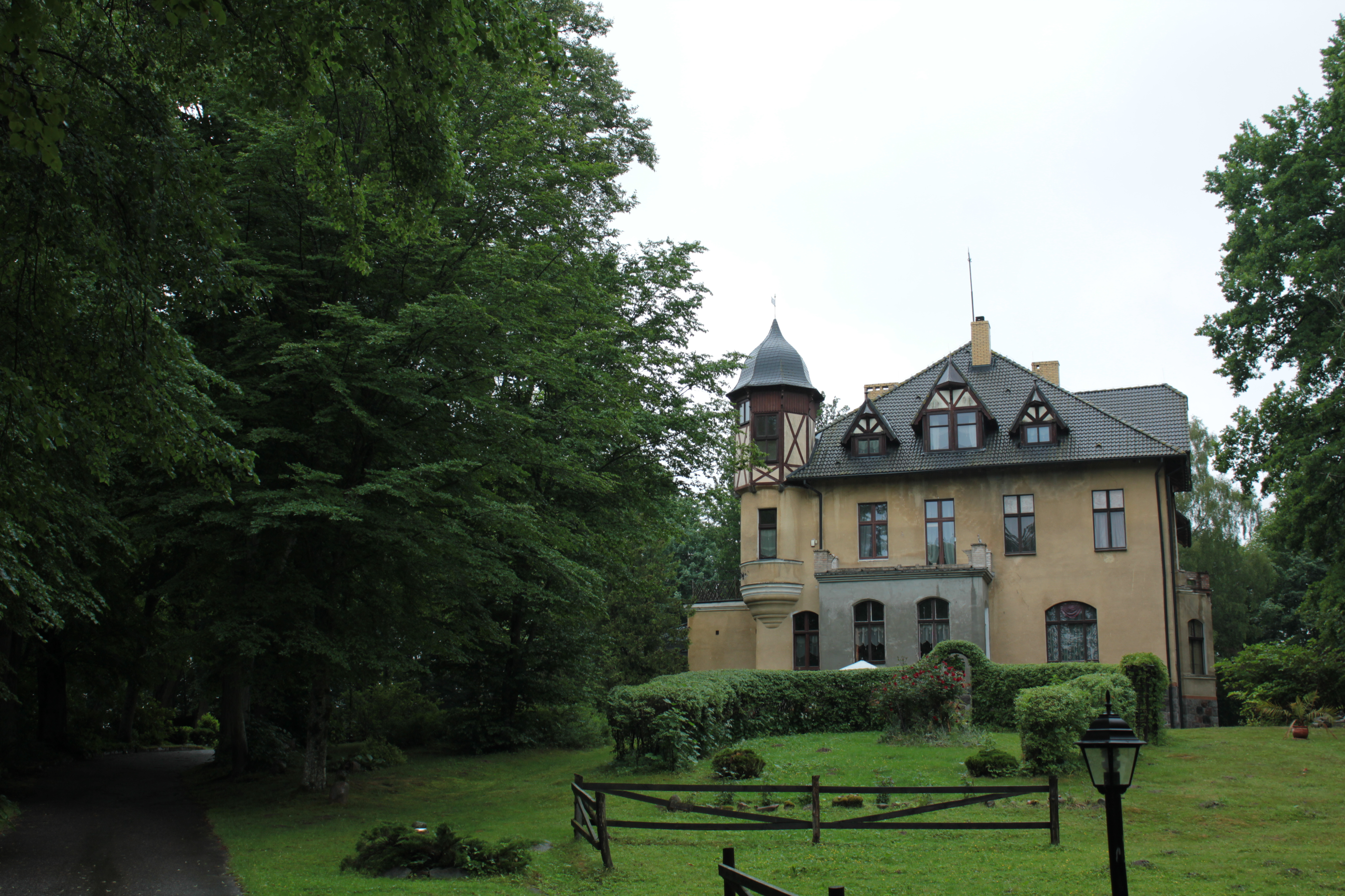 Poganice - dwór, pocz. XX